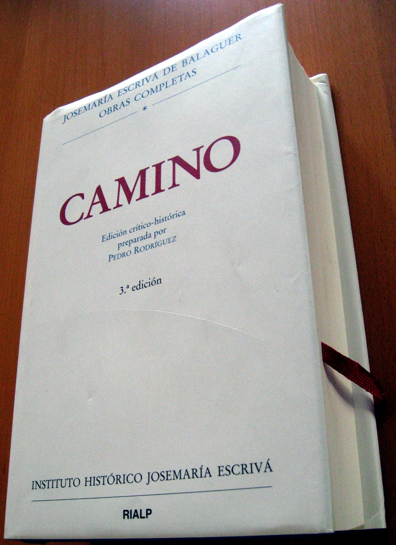 Camino, edicion critica